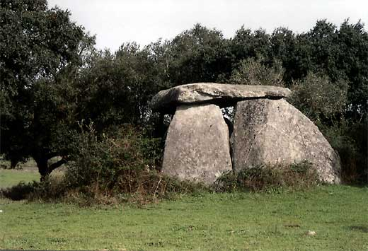 dolmen dit "Anta do Paço das vinhas", région d'Evora, Portugal Source : Bruno MARC Licence : GFDL Bruno MARC